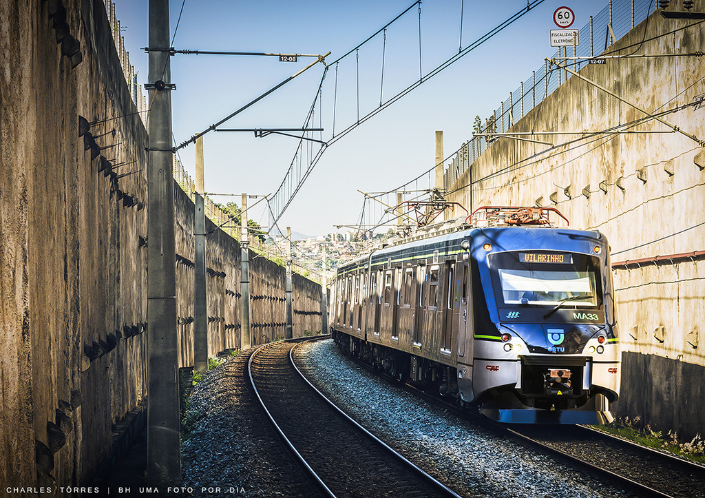 TUE nº 33 do Metrô de Belo Horizonte. Foto de autoria do fotógrafo Charles Tôrres.